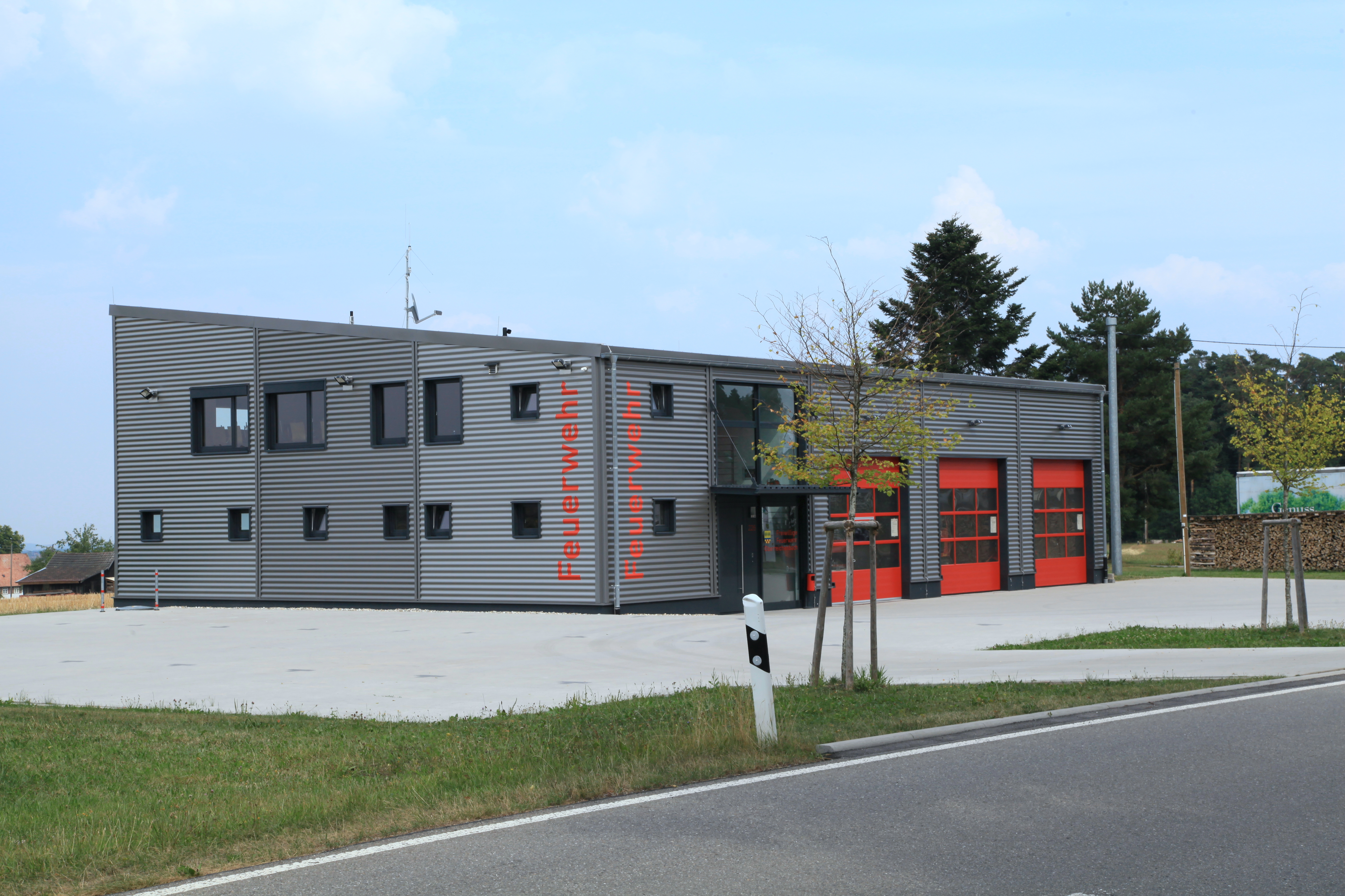 Alte Badstraße in Siehdichfür, Oberreichenbach (Schwarzwald)